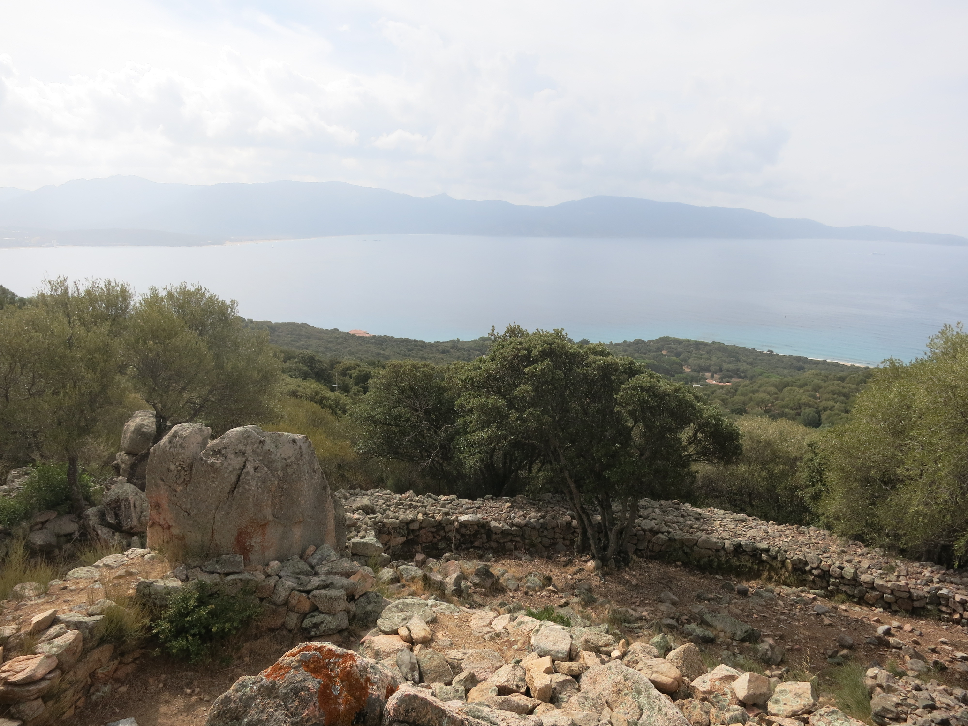 Castello di Cuntorba Edifice toréen datant de l’âge du bronze (environ 1 500 ans avant Jesus-Christ), le Castello de Cuntorba est un des plus grands castelli de Corse. Situé sur la commune d'Olmeto, au-dessus du golfe de Valinco, il est ceint d’un mur de 94 mètres de long et d'environ 2,5 mètres de large. Le monument central est une pièce circulaire d’un diamètre de 4 mètres. Un long couloir de 8 mètres conduit à la pièce principale, appelée la Torra. .